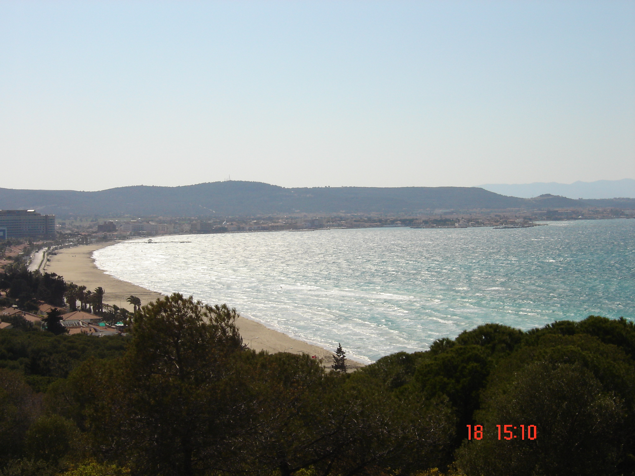 Ilıca Beach in Cesme (Izmir-Turkey)